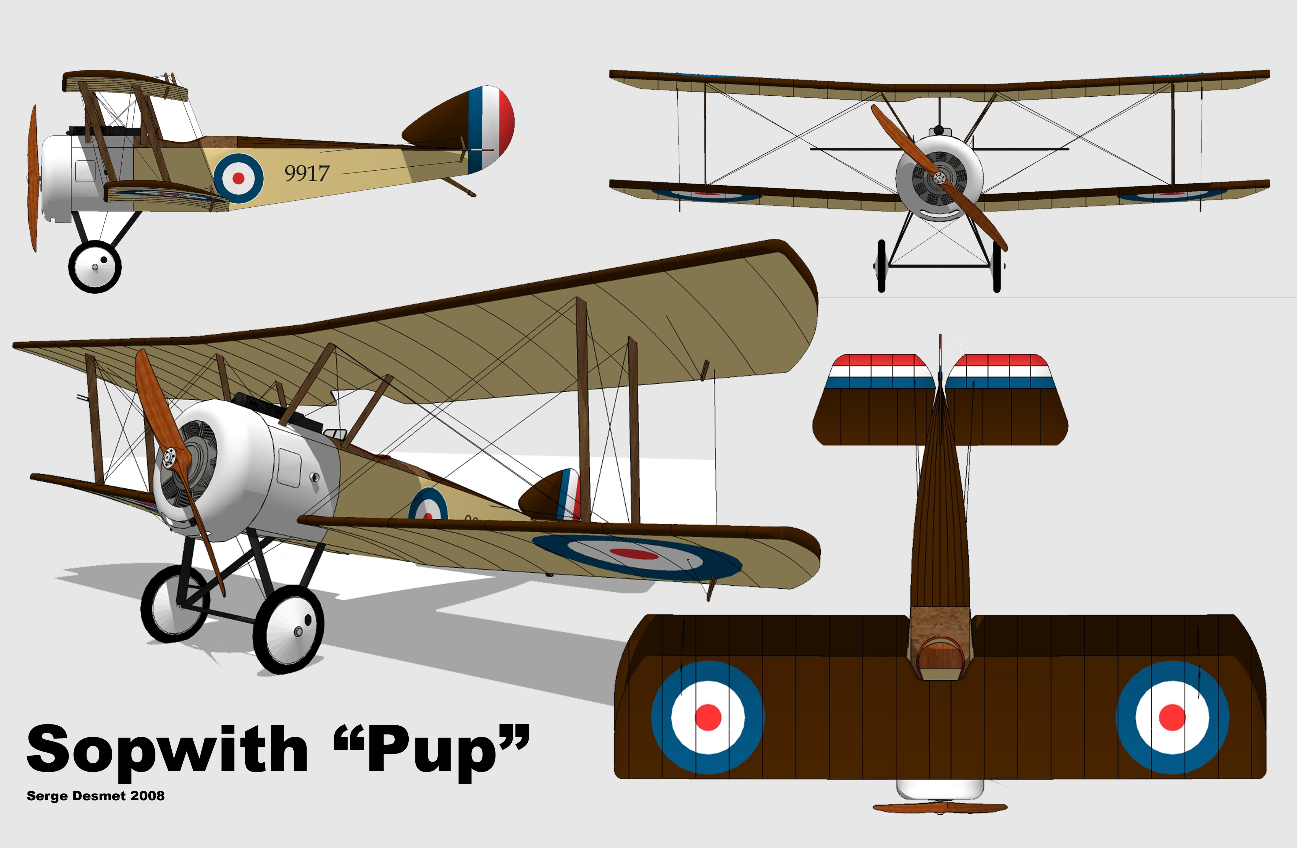 Plan 3 vues du Sopwith Pup